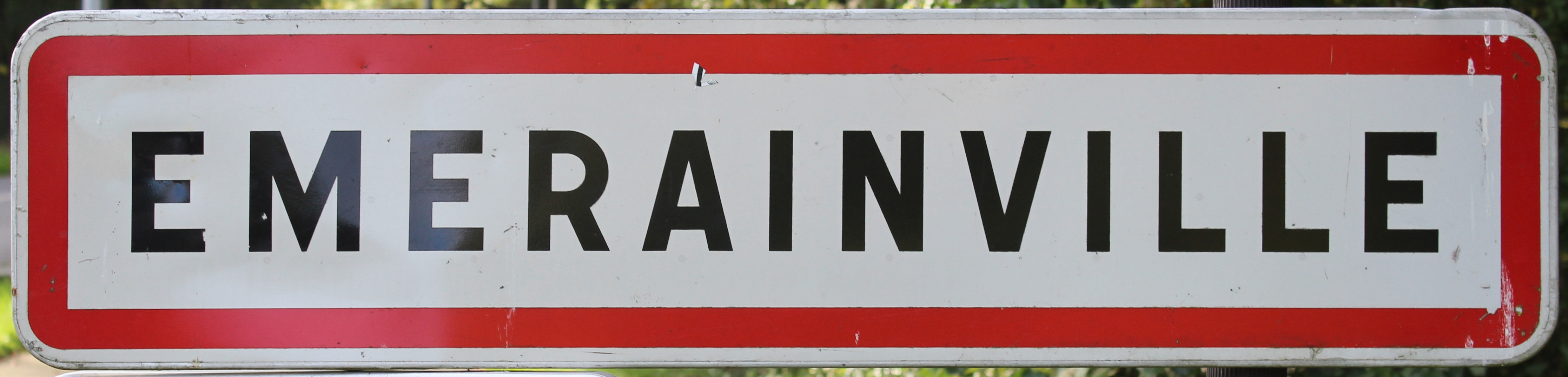 Panneau d'entrée dans Émerainville.